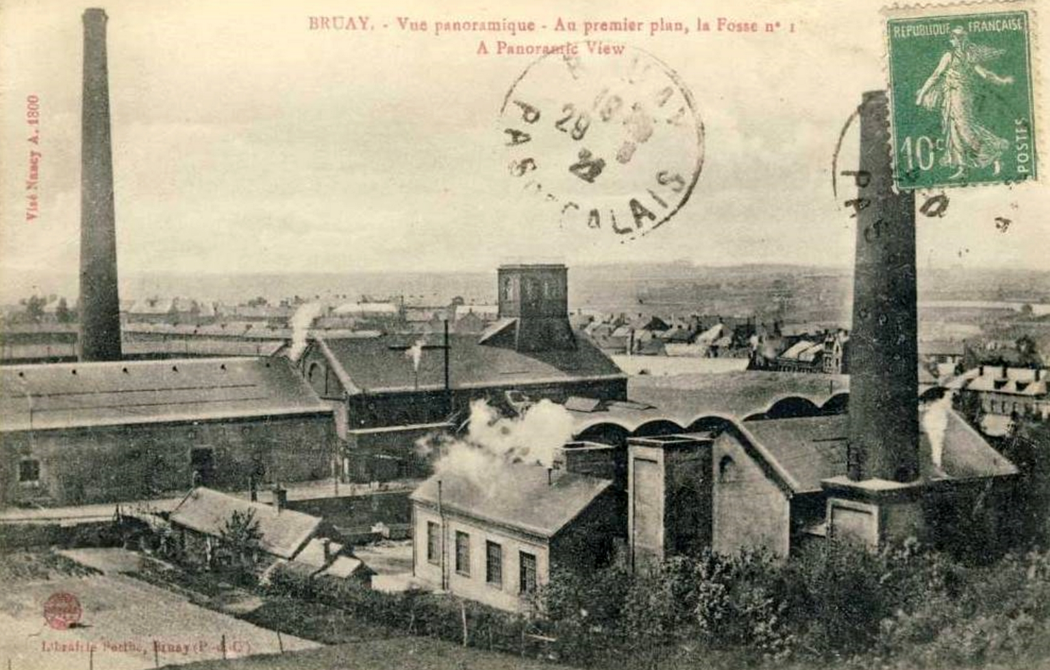 Fosse 1 de Bruay vue de l'arrière